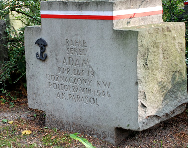 Gróba na Powązkach wojskowych